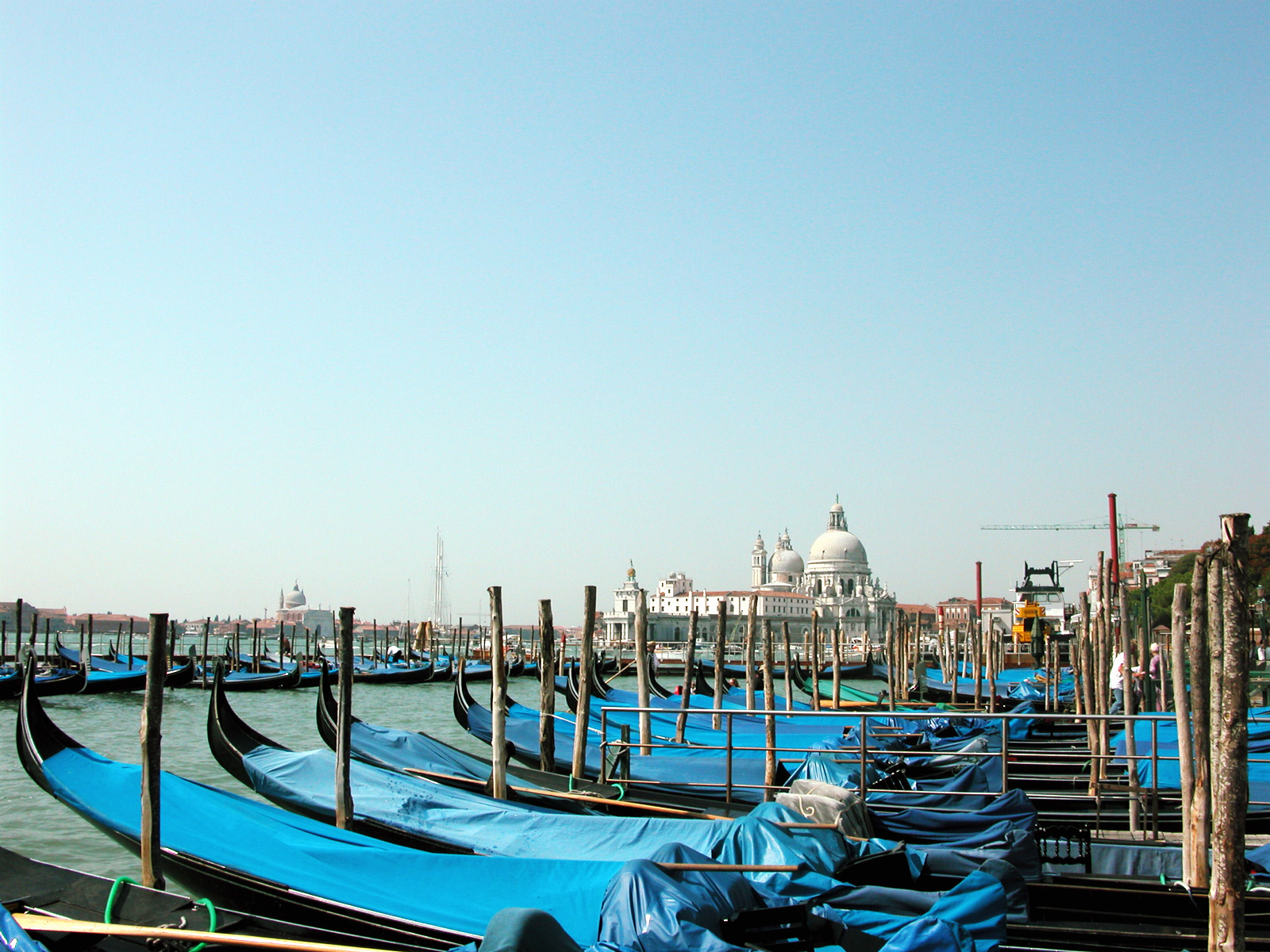 Photo by Quang Nguyen on August 27, 2003.